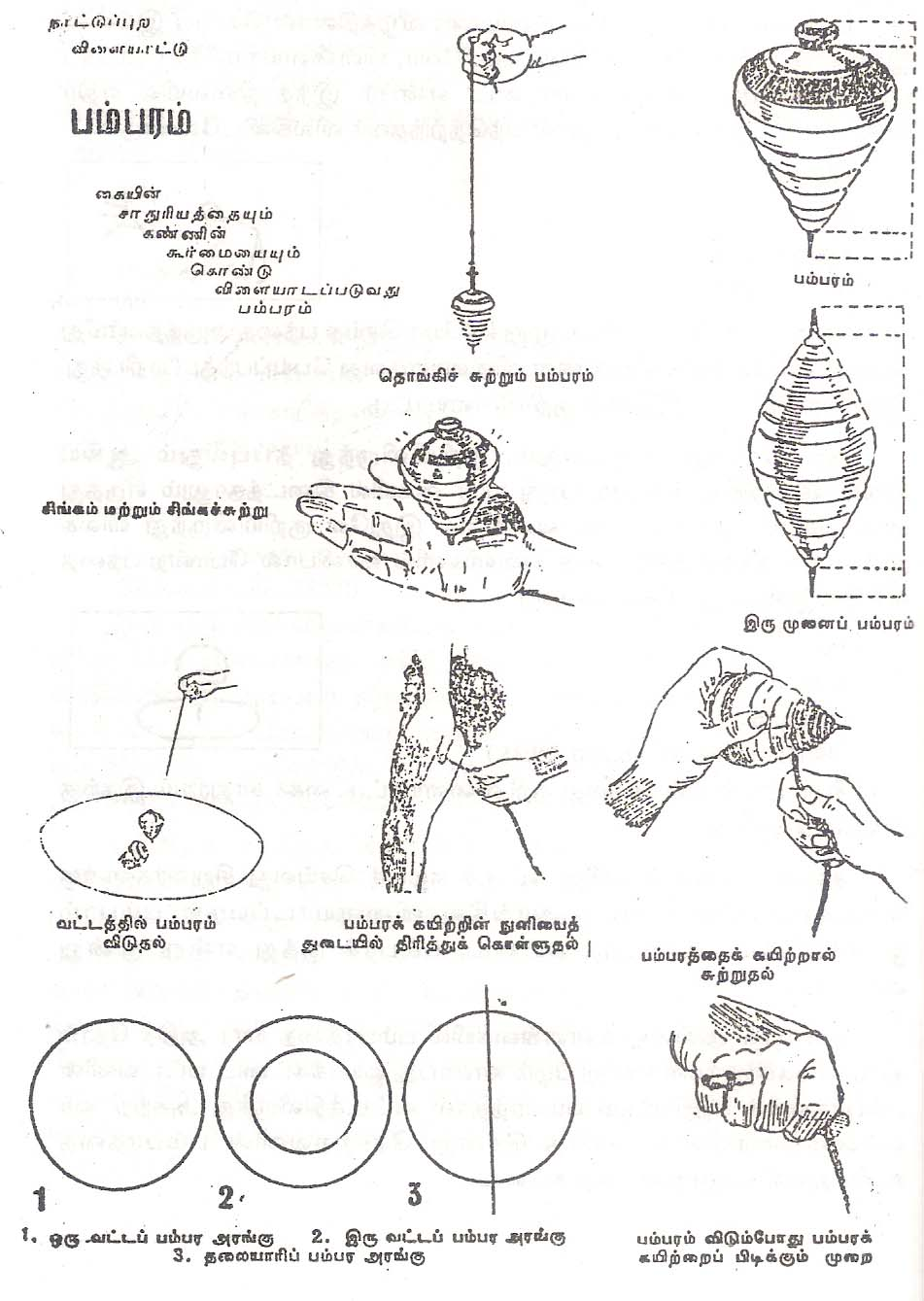 Top, பம்பரம் is an indigenous game in India, famous up to 1950. Source is scanned from the book “vanishing games of Tamil Nadu”. மறைகின்ற விளையாட்டுகள் published in 2002. The author of the book and the up-loader